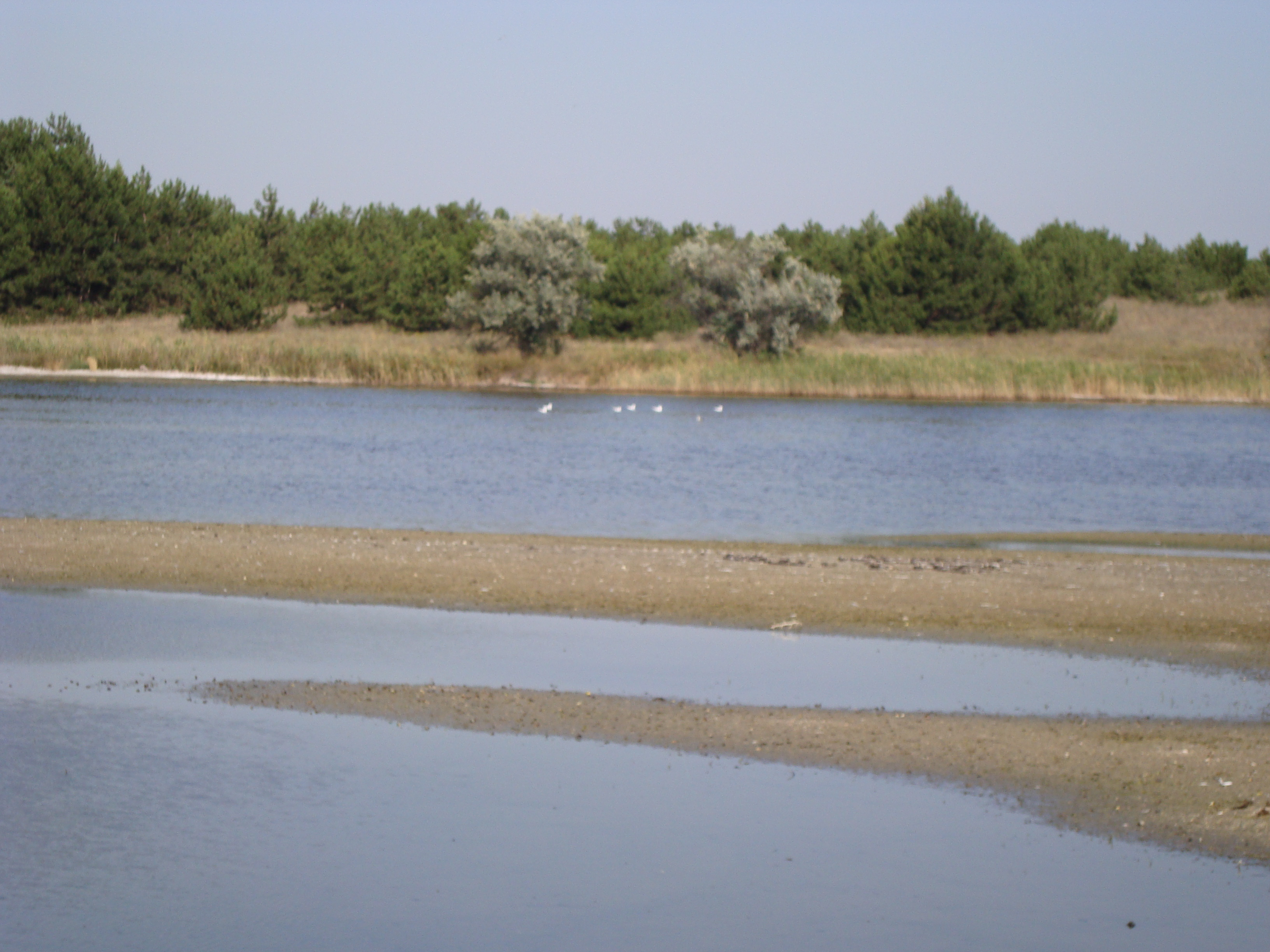 «Кінбурнська коса», Очаківський р-н